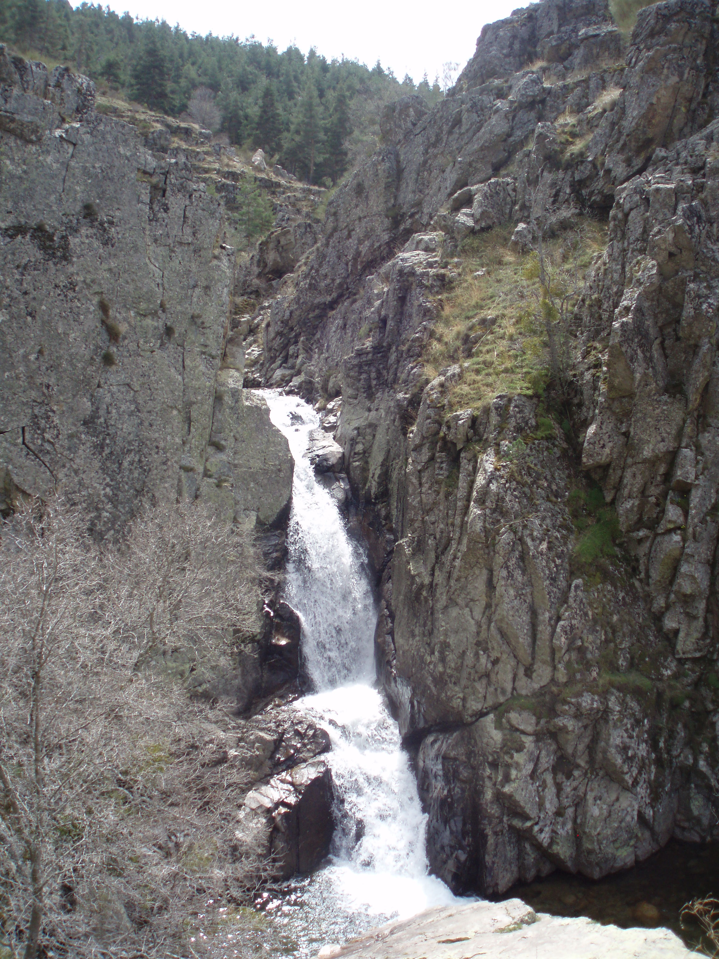 Cascada alta de las Cascadas del Purgatorio (Sierra de Guadarrama, España).